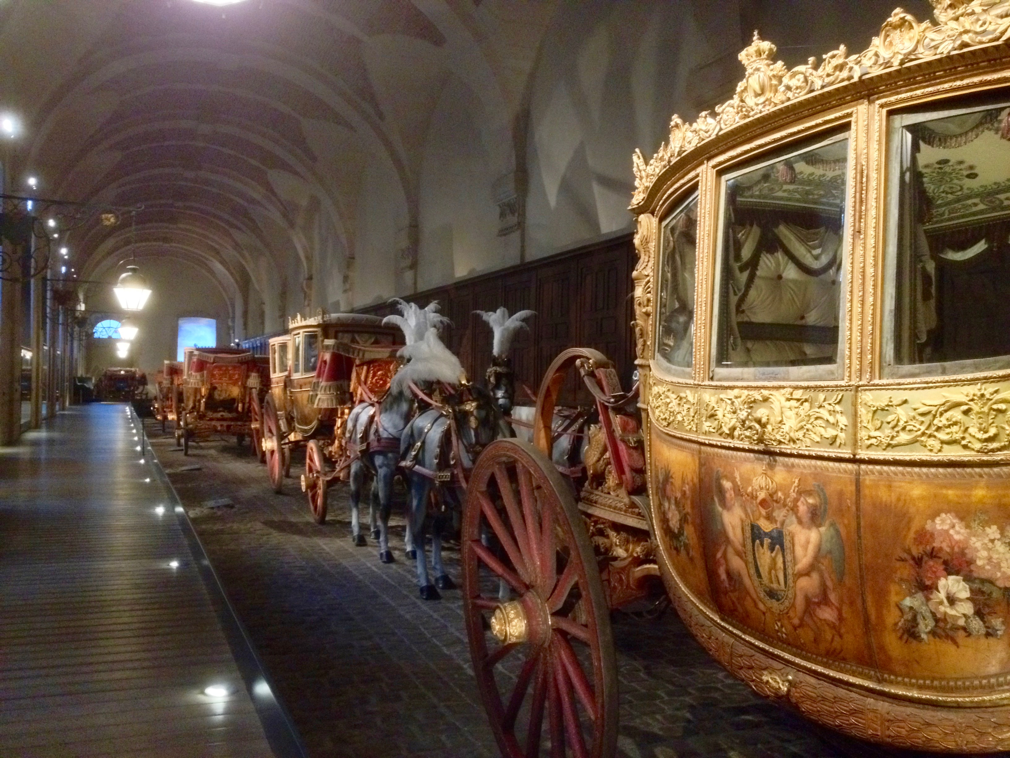 Jean-Ernest-Auguste Getting (carrossier): Berline du Baptême du Duc de Bordeaux, Berline de grand gala à sept glaces (huit à l'origine), Paris, 1808, réalisée pour Jérôme Bonaparte, roi de Westphalie, frère de Napoléon Ier, exposée à la Galerie des Carrosses, Grande Écurie du château de Versailles, Versailles, France.